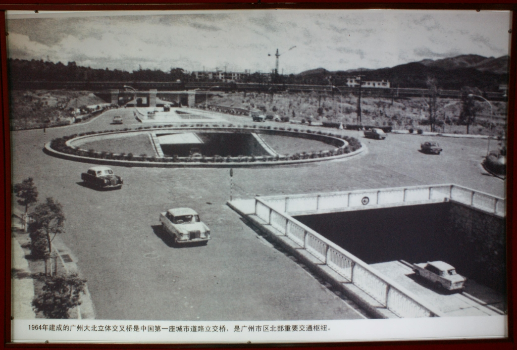 大北立交旧貌